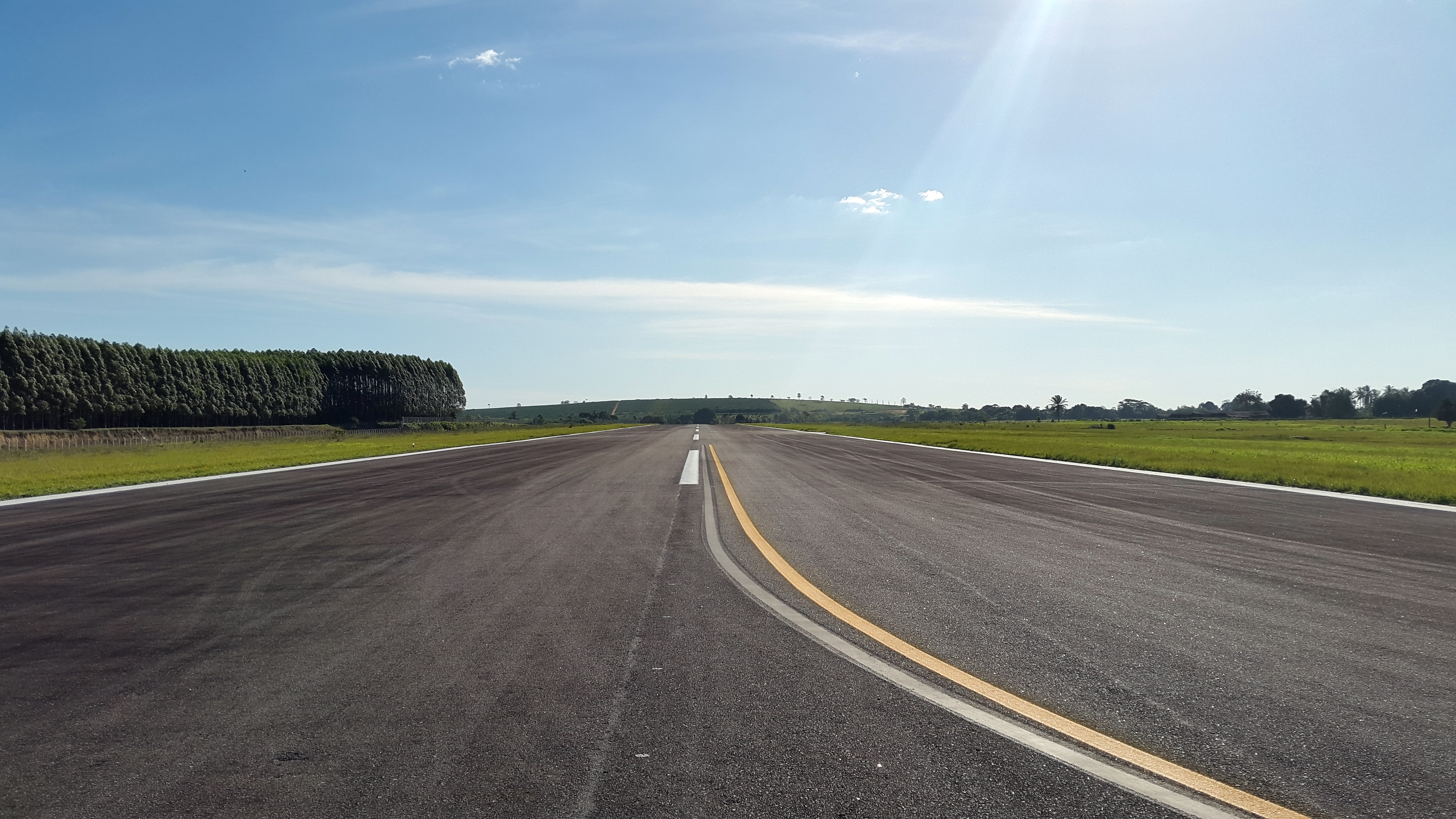 Visão da pista do aeroporto.